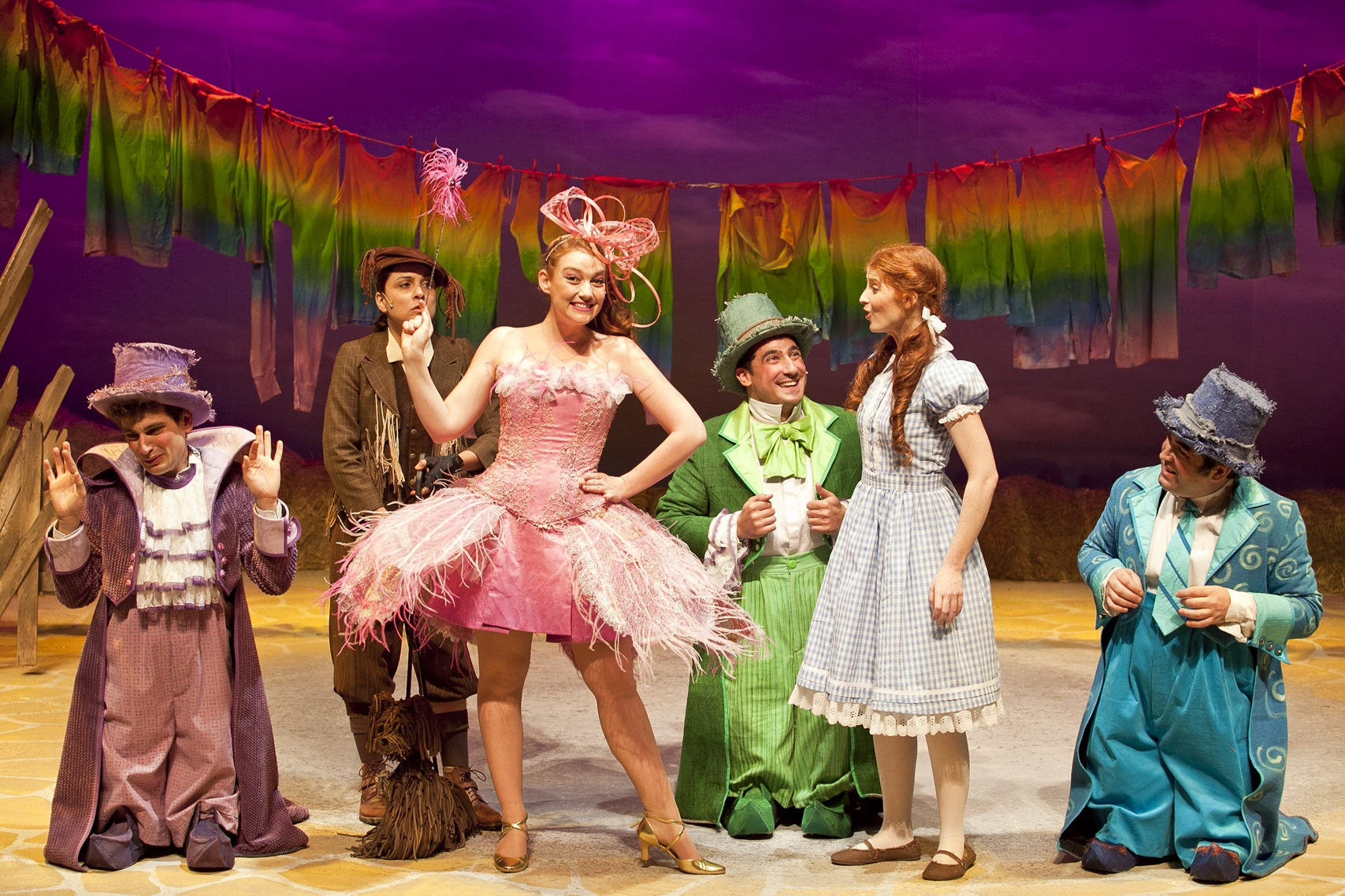 ההצגה הקוסם מארץ עוץ, בבימויו של גלעד קמחי, עיצוב תלבושות של אולה שבצוב, עיצוב תפאורה ערן עצמון, עיצוב תאורה עדי שימרוני, תיאטרון בית ליסין, 2011